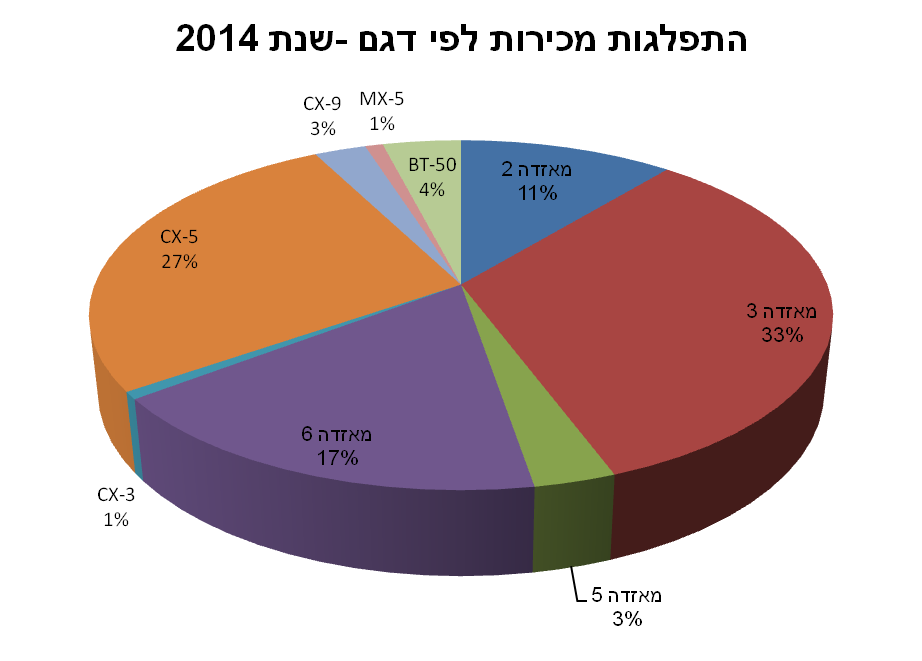 התפלגות מכירות מאזדה בעולם לפי דגמים- הנתונים נכונים לשנת 2014